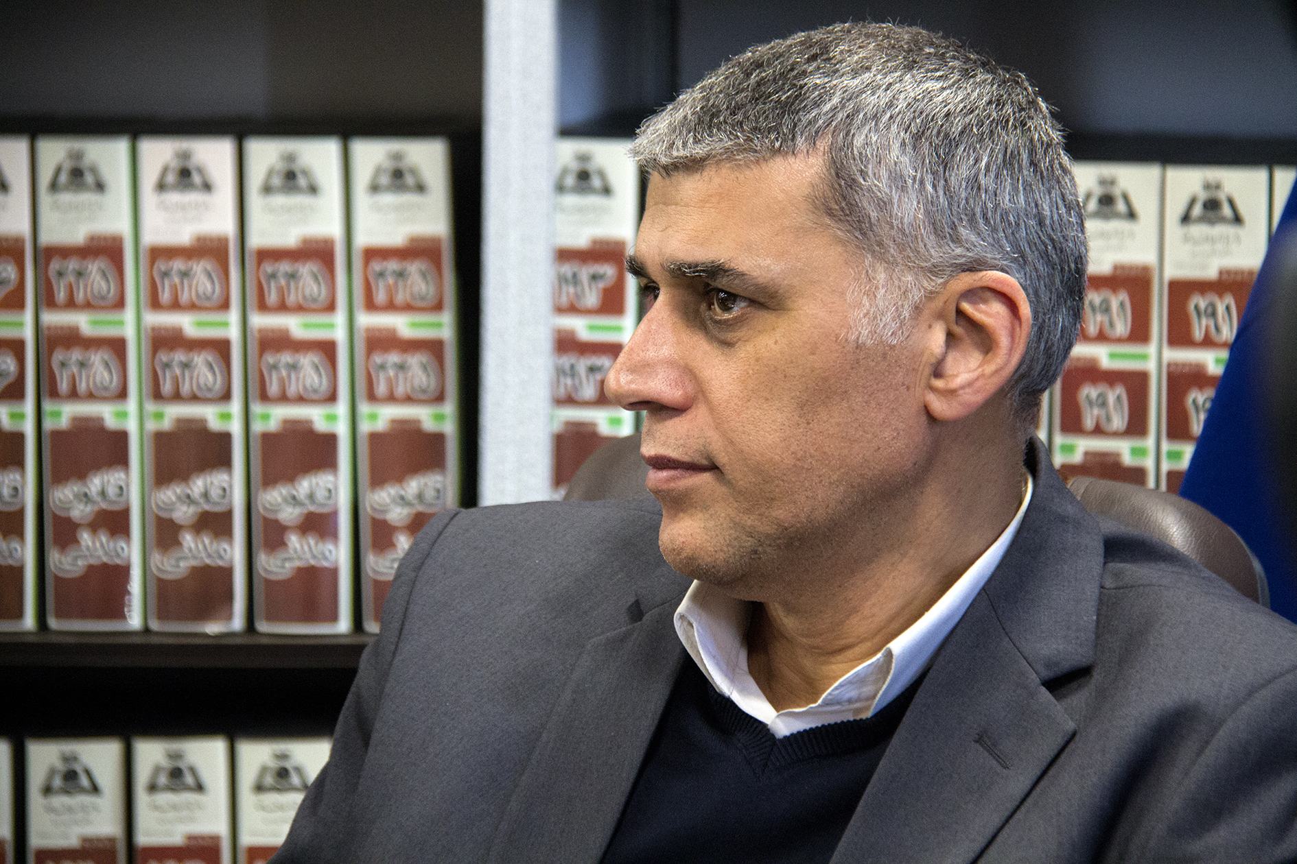 فریدون نهرینی در مرکز پژوهشی دانشنامه های حقوقی علامه